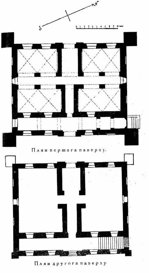 Беларуская (тарашкевіца): Замак вялікай княгіні Боны ў Рагачове